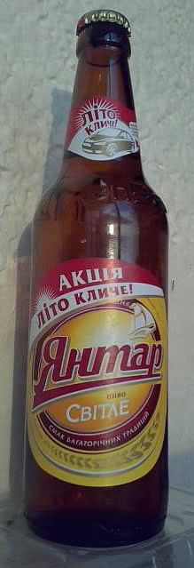 Пляшка пива "Янтар світле": Пляшка пива "Янтар світле"